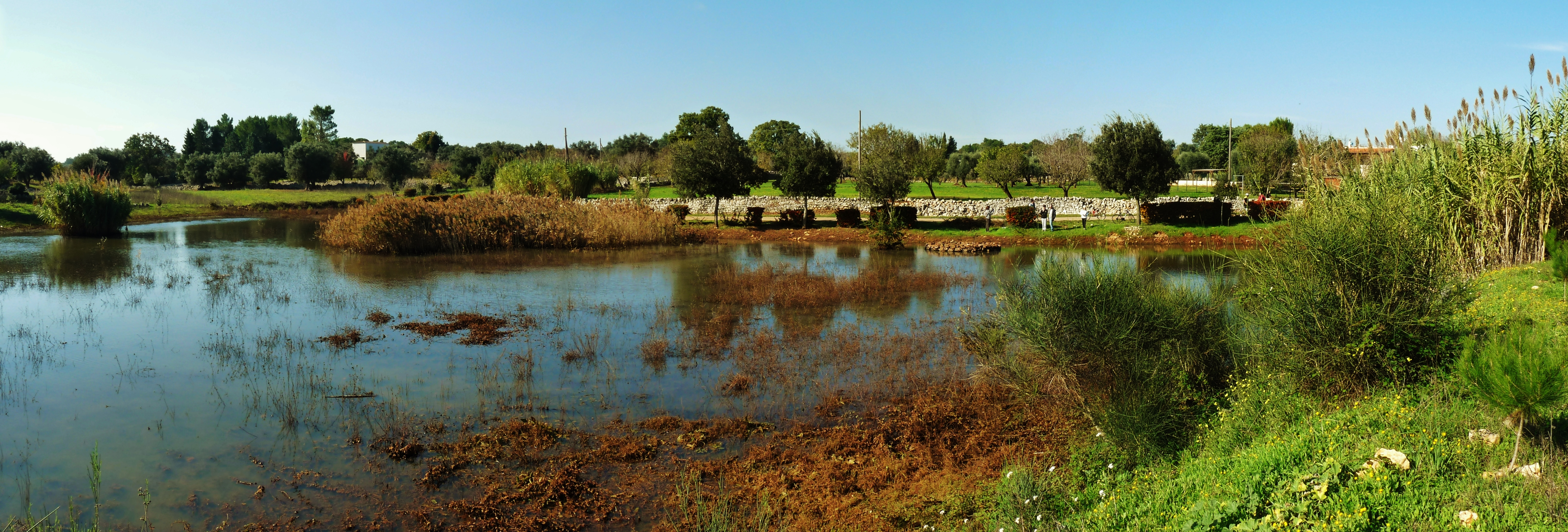 L'area naturale foggia di Sant'Anna a Ceglie Messapica